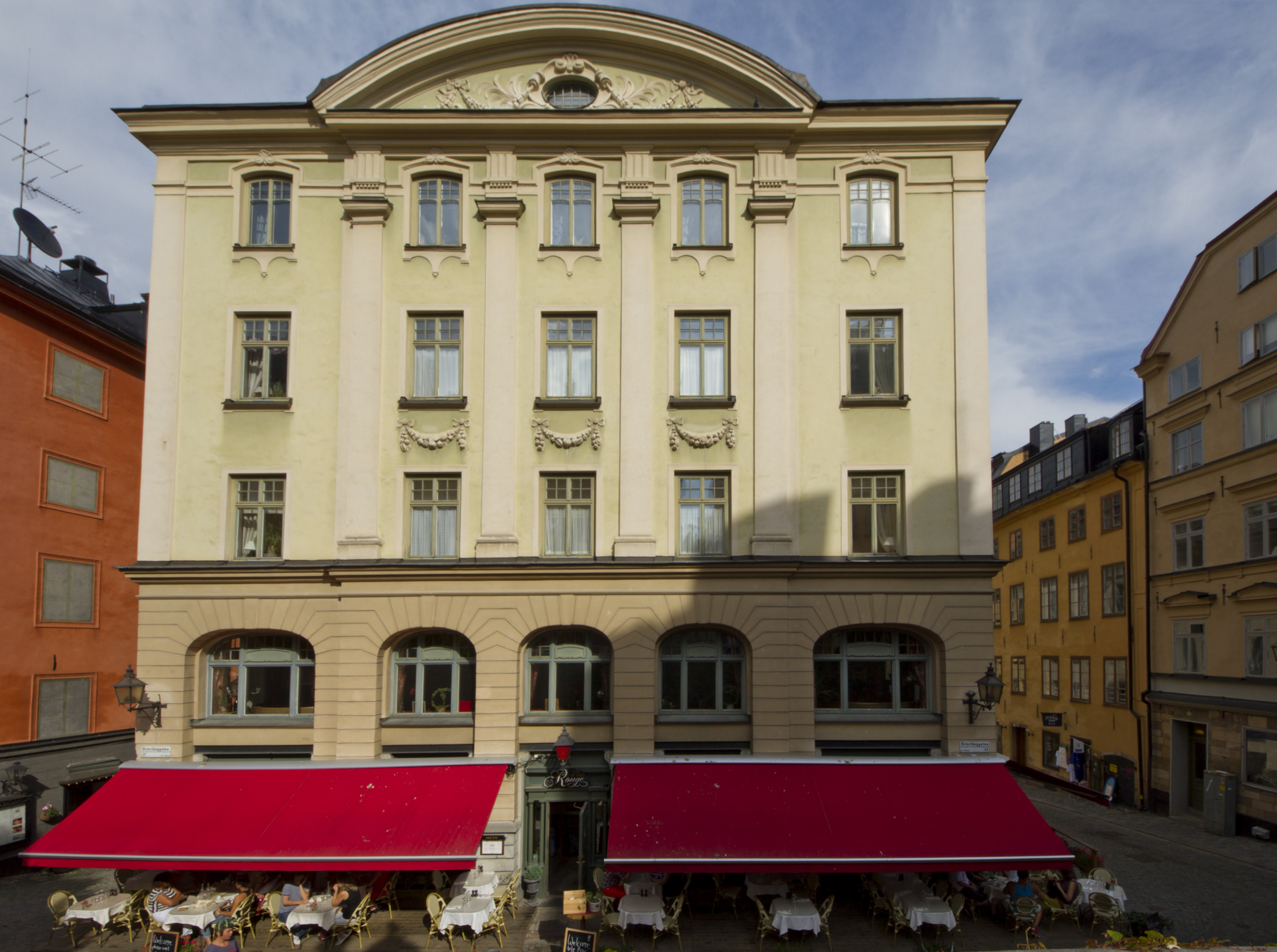 Brasserie Le Rouge, Gamla Stan, Södermalm, Stockholm, Sweden